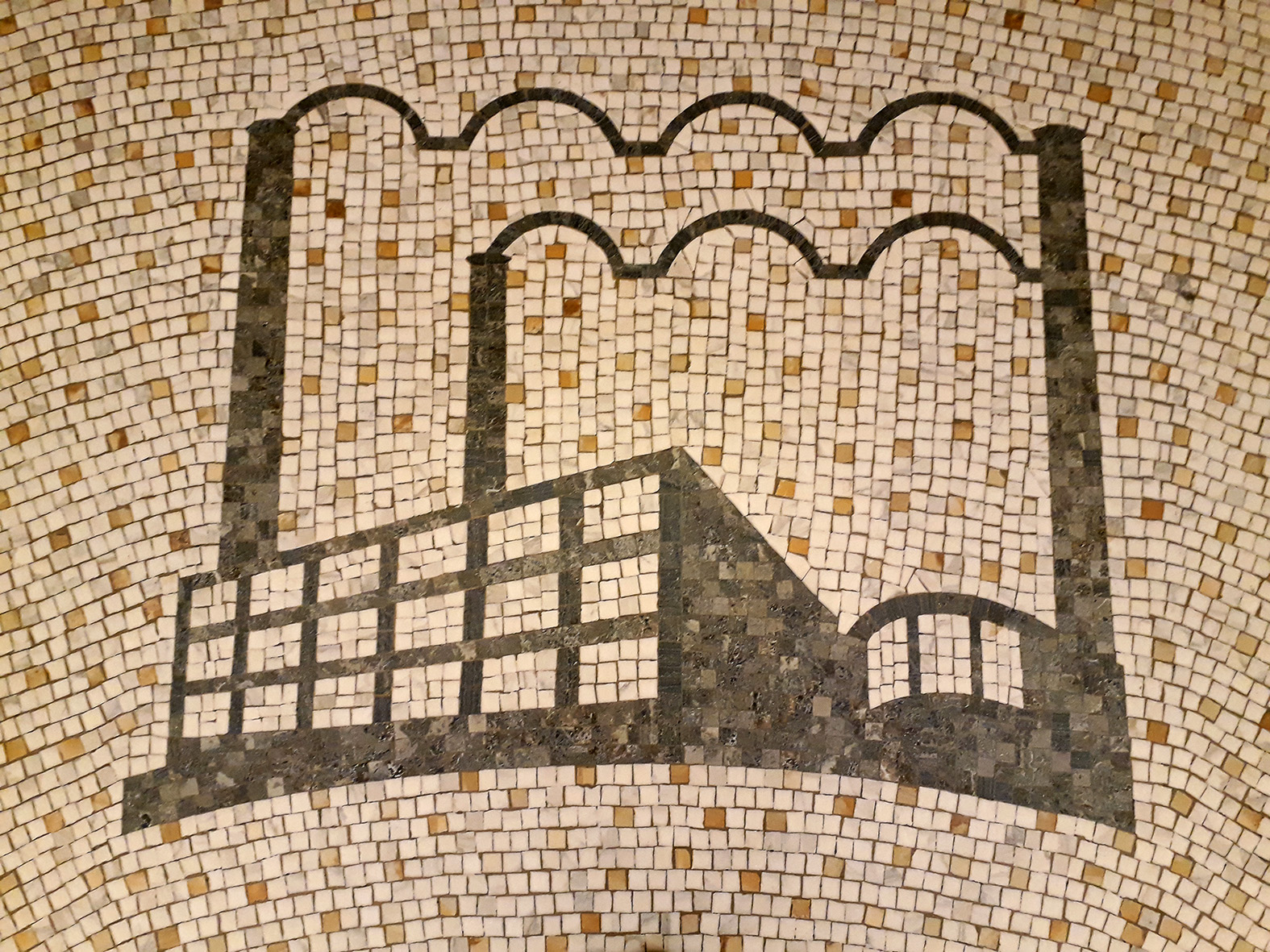 Eduskuntatalon hissiaulojen lattiamosaiikkia